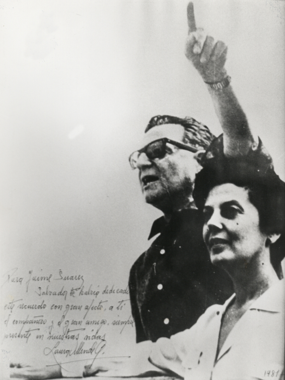 1981. Para Jaime Suárez, Salvador te habría dedicado este recuerdo con gran afecto, a ti el compañero y el gran amigo, siempre presente en nuestras vidas. Laura Allende Gossens (Valparaíso, 3 de septiembre de 1911 - La Habana, Cuba, 23 de mayo de 1981) fue una política chilena, hermana de Salvador Allende.